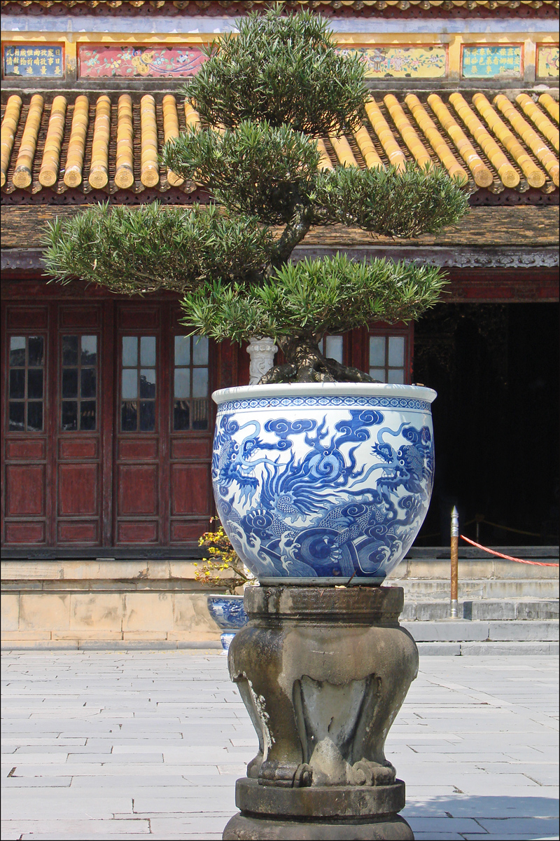 La céramique bleue de Hué est célèbre, elle était fabriquée en Chine sur commande du souverain et de l'aristocratie, à partir de cartons peints par des artistes vietnamiens. Le vase photographié se trouve devant le Palais de l'Harmonie Suprême dans la cour des Cérémonies.